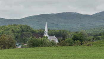 Vue sur l'église Saint-Adolphe, Dudswell.